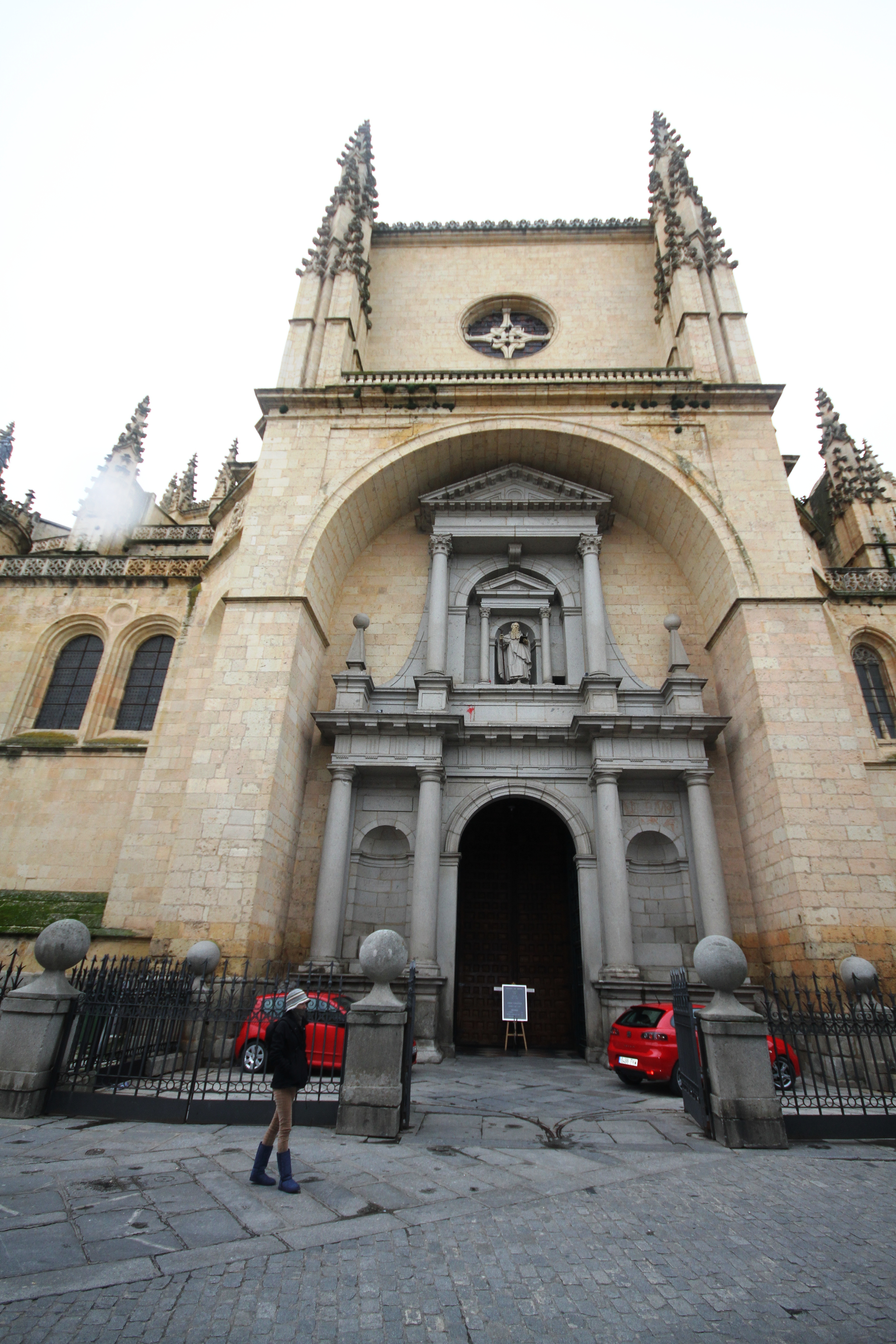 Catedral